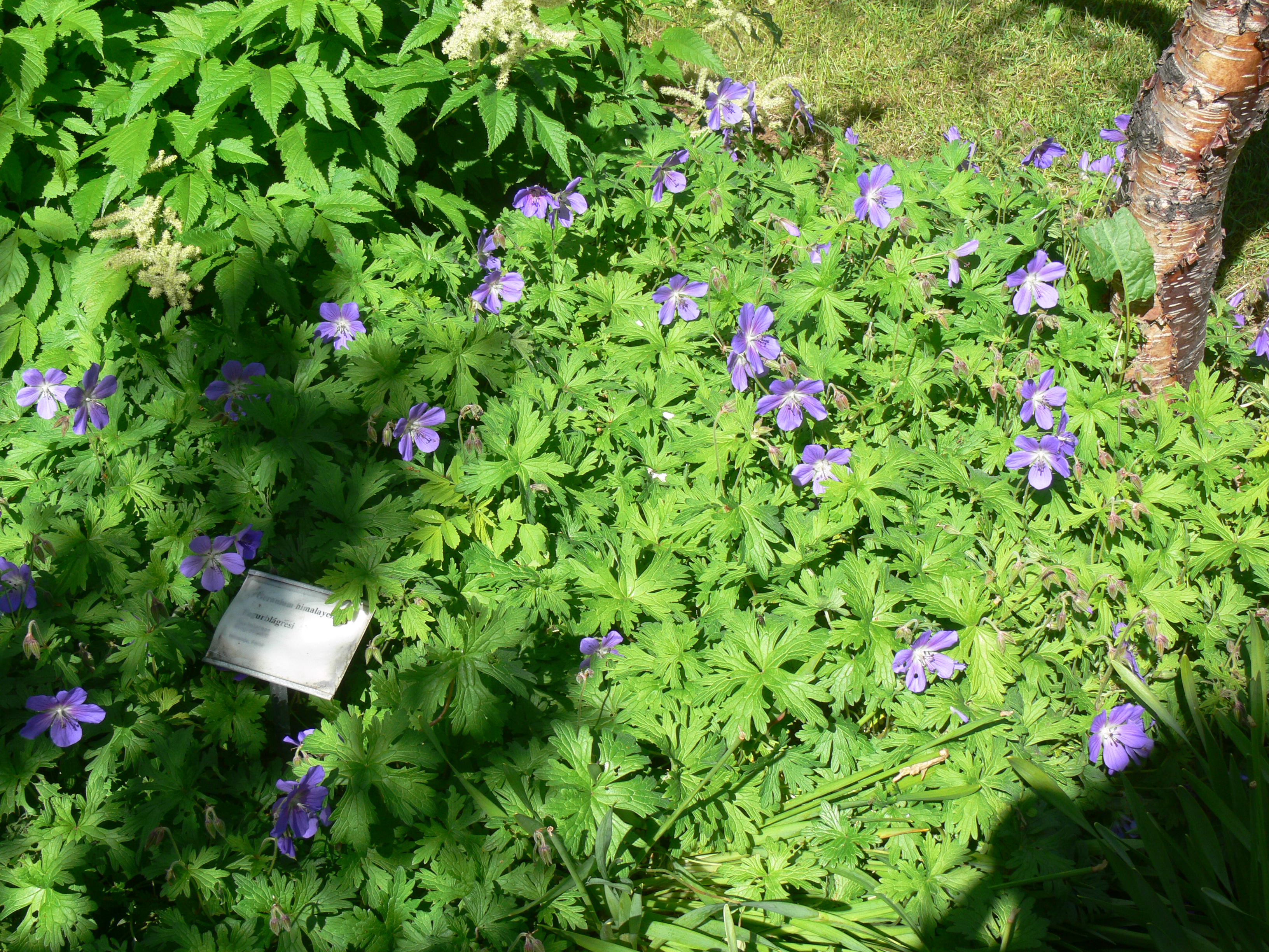 Himalaya-Storchschnabel in der Parkanlage Skrúður in der Nähe von Núpur.